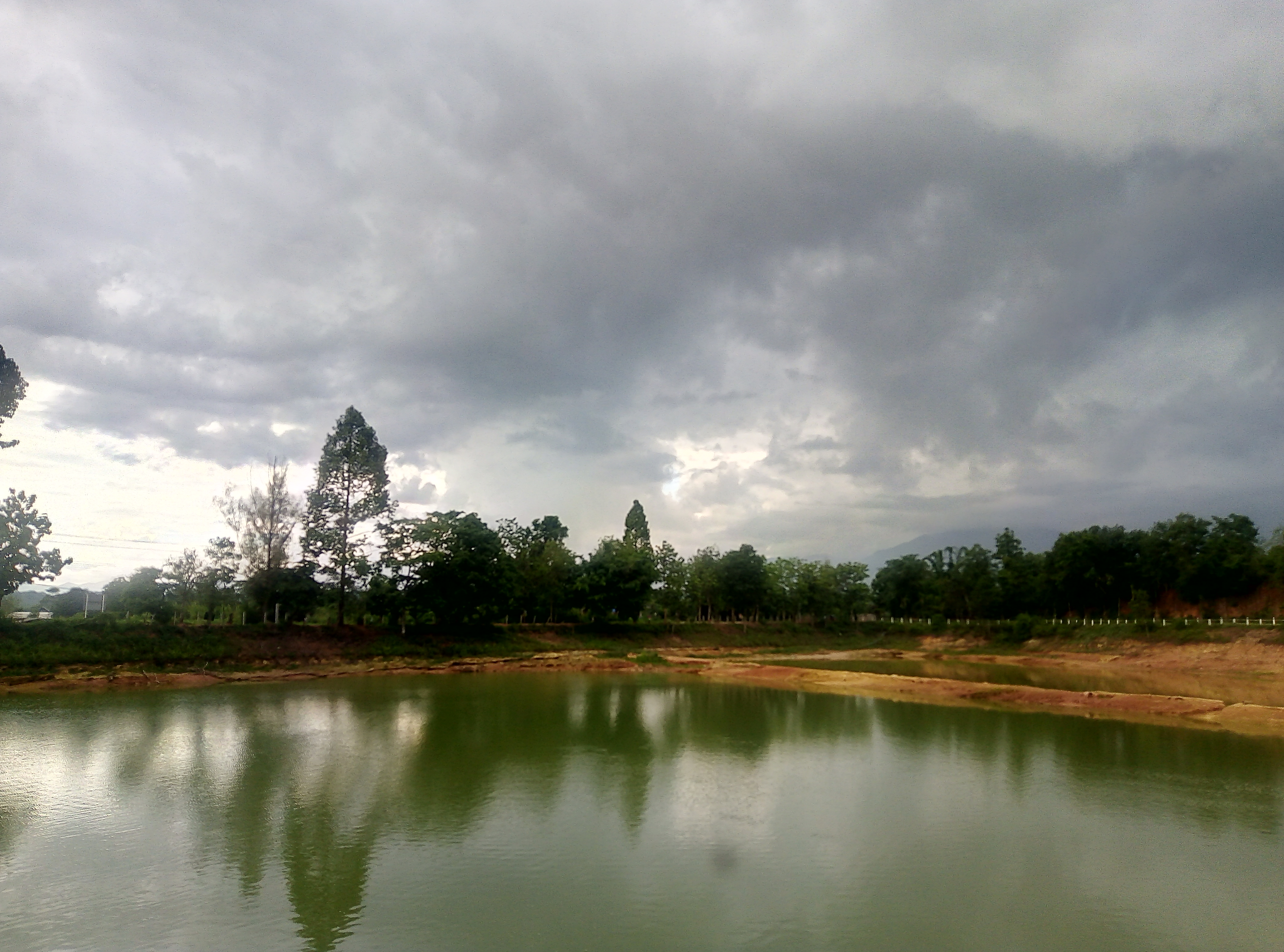 ภาพถ่ายบรรยากาศในฤดูฝนในเดือนมิถุนายน ที่ ต.แม่สูน อ.ฝาง จ.เชียงใหม่